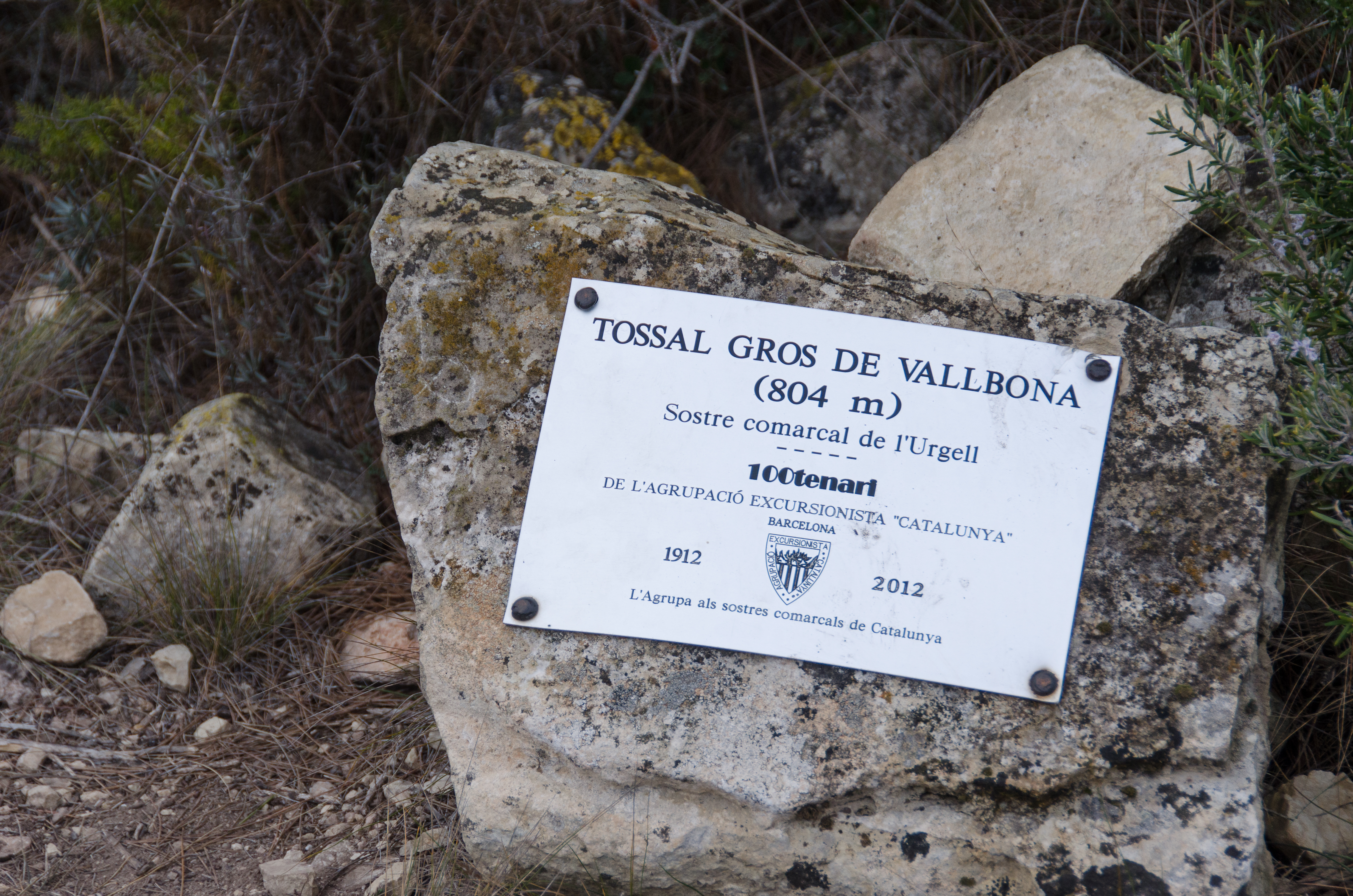 Placa del sostre comarcal de l'Alt Urgell